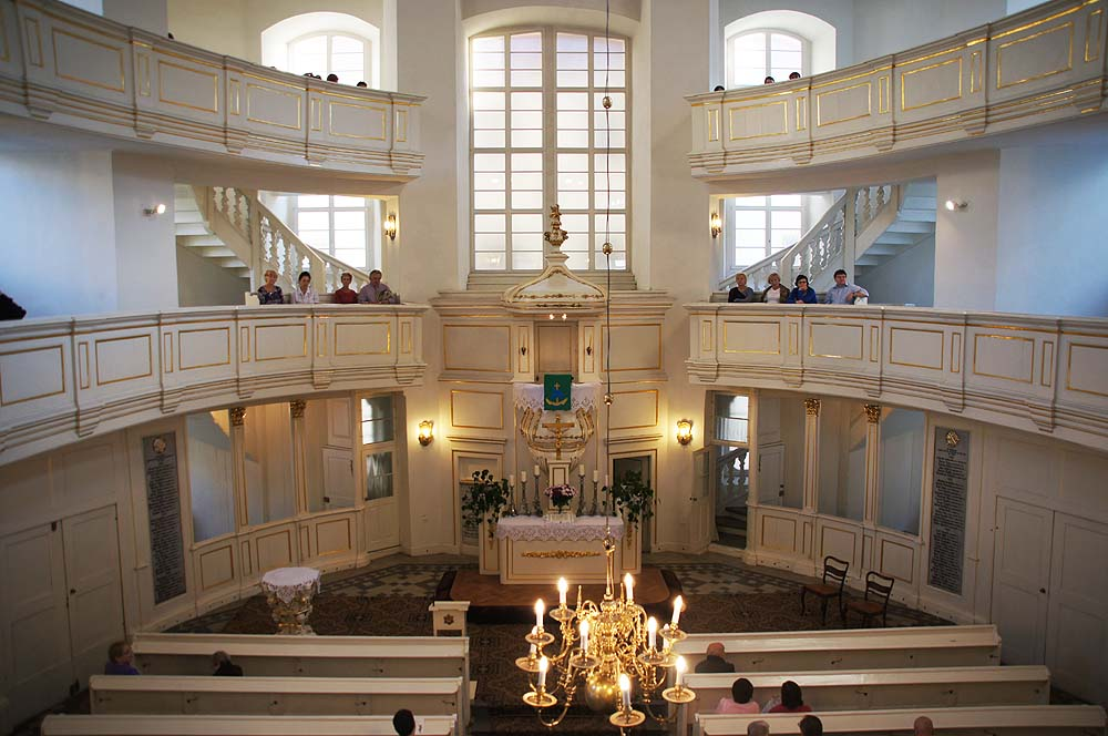 Kościół parafialny Opatrzności Bożej – zwany Dworskim (ewangelicki) Kazimierza Wielkiego 29, Miasto Wrocław - Stare Miasto